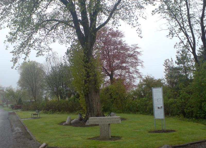 Warningsacker in Hadeln